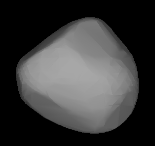 Modello 3D di 6 Hebe, ricavato dalla curva di luce. Riferimenti: M. Kaasalainen, J. Torppa, e J. Piironen, Models of twenty asteroids from photometric data, Icarus 159, 2002